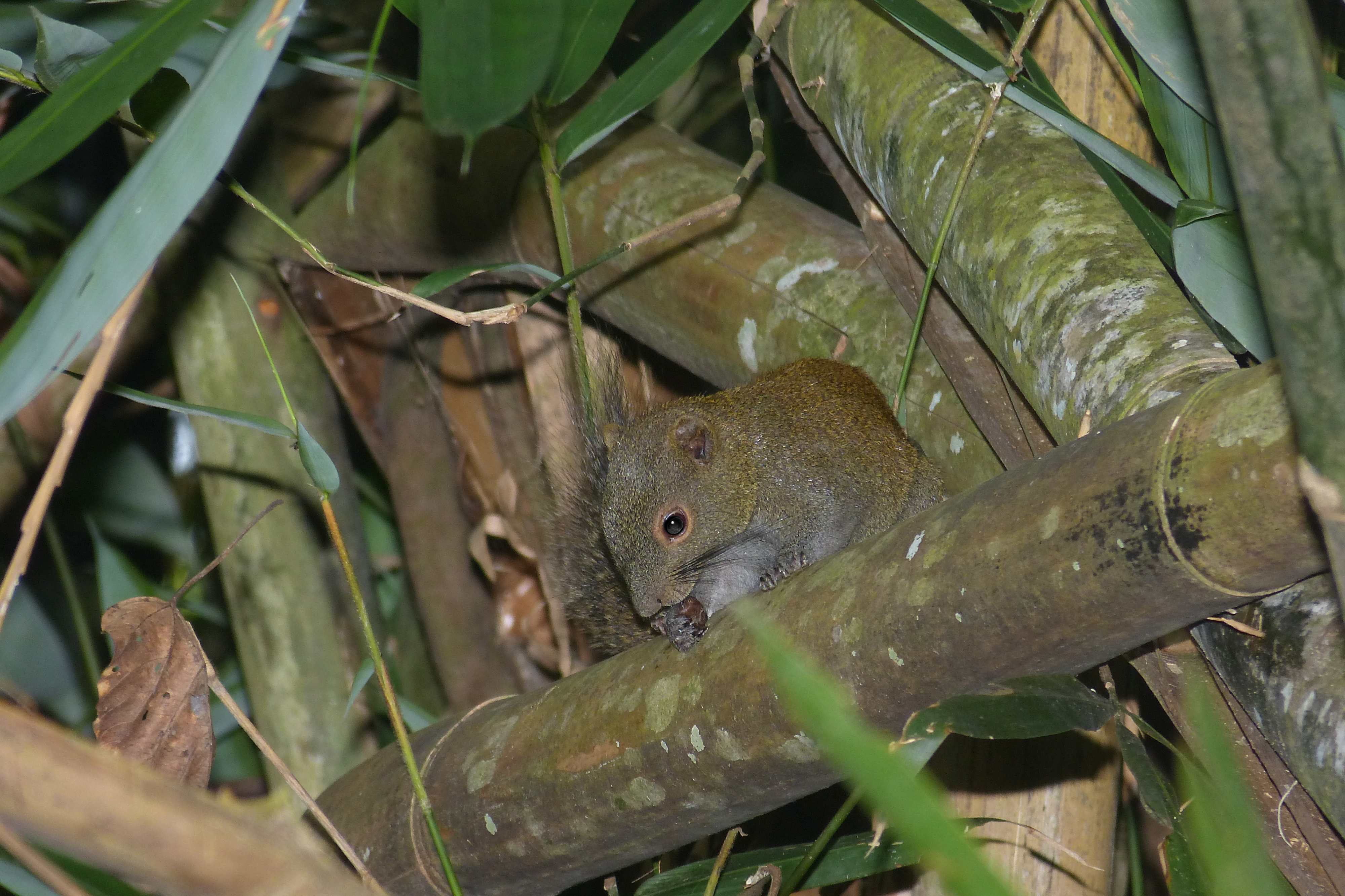 Taman Negara NP, Pahang, MALAYSIA